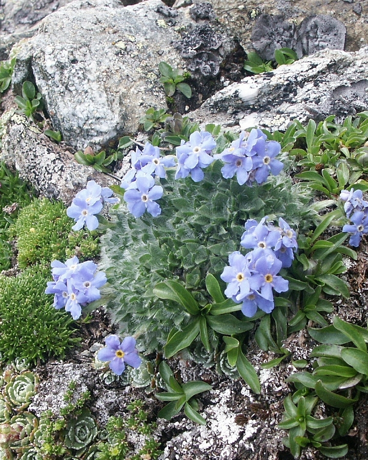 Eritrichium_nanum, Klafferschneide, Schladminger Tauern, Styria, Austria